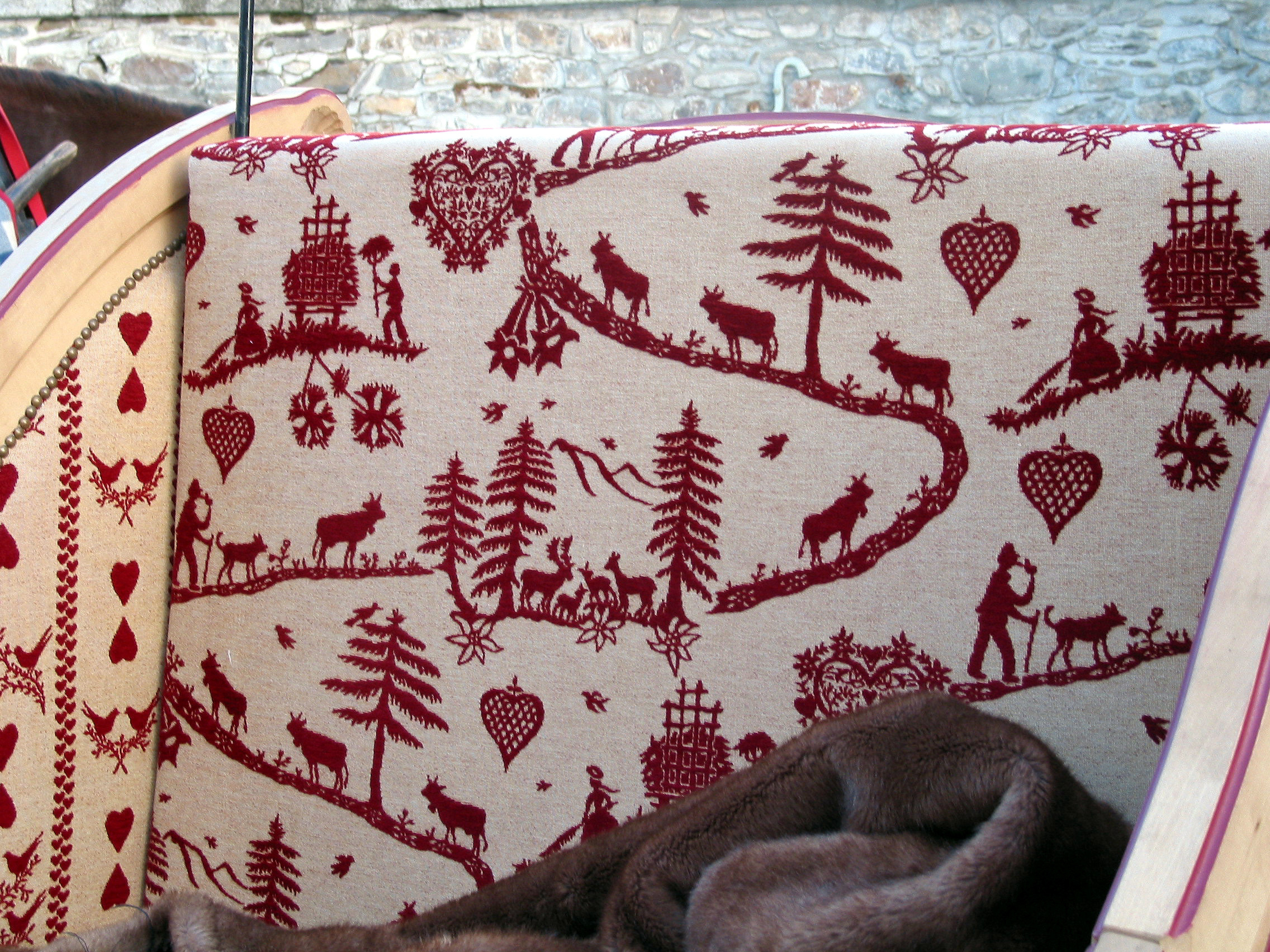 Megève (France), place de l'église - Broderie régionale ornnant les parois intérieures et le siège d'une calèche.